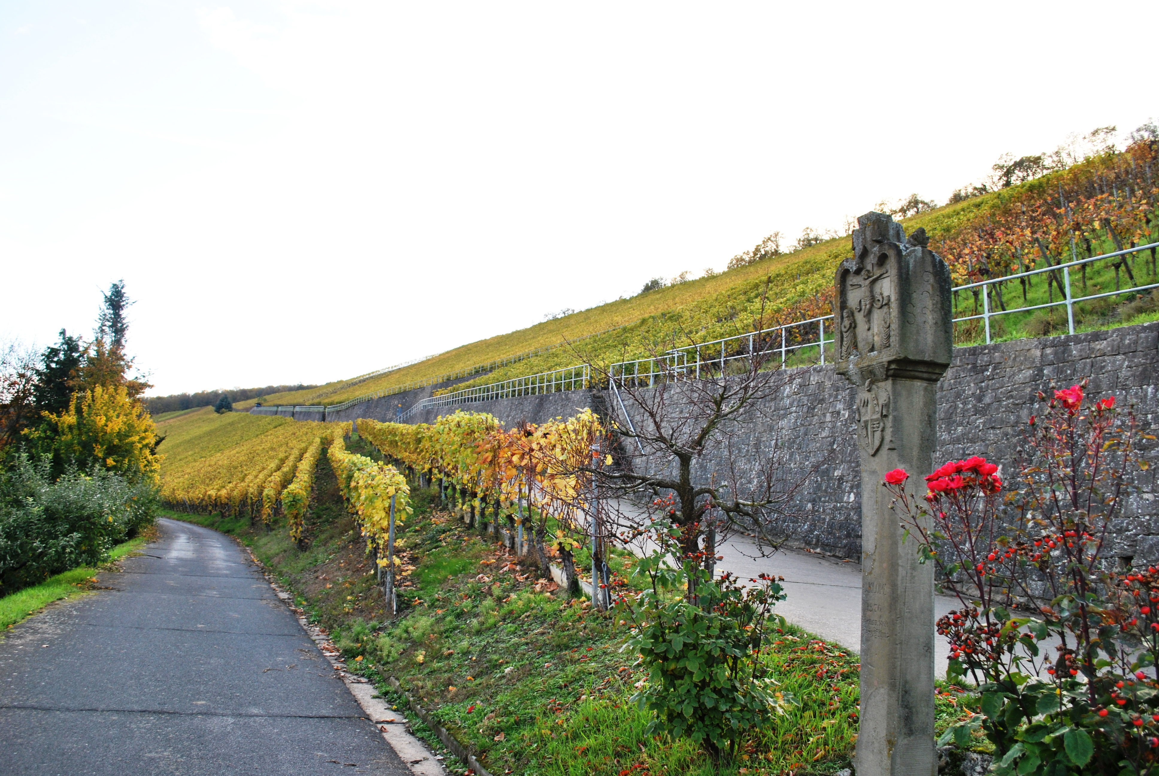 Köhler Fürstenberg, Weinlage, Bildstock von 1605